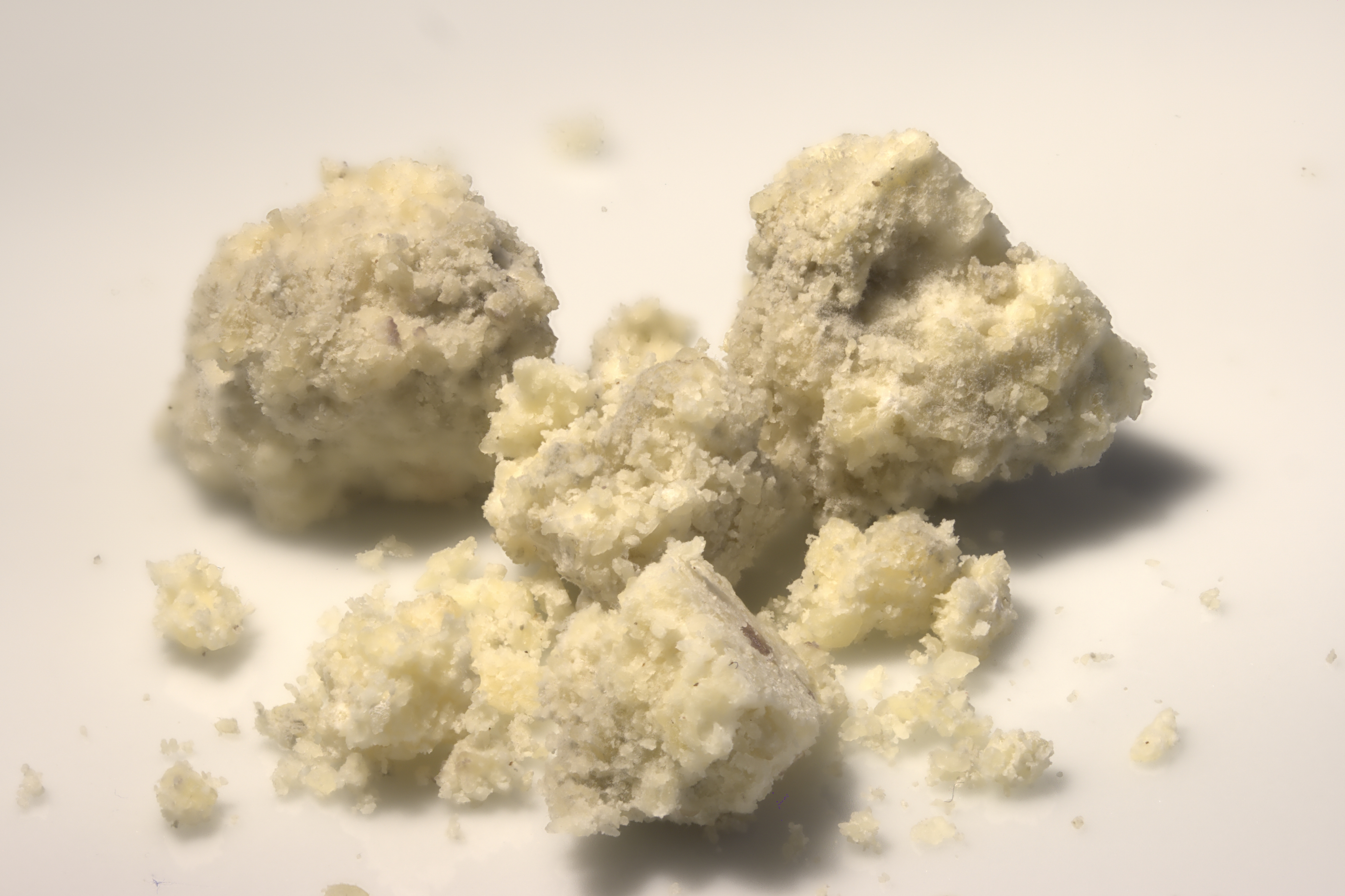 Steirekäse